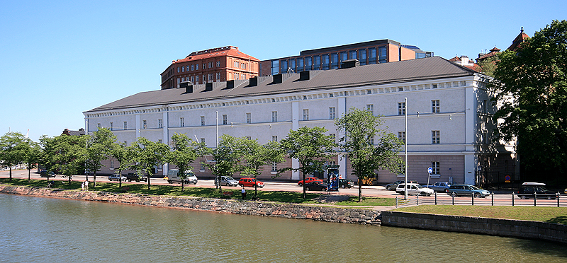 Provianttimakasiini, Siltavuorenranta 16, Helsinki. Arkkitehti: August Boman. Rakennusvuosi: 1886.